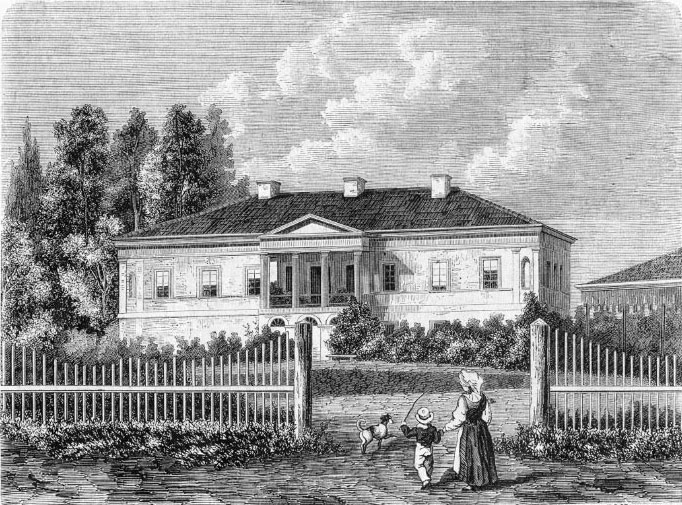 Беларуская (тарашкевіца): Яшуны (Jašuny), сядзіба Балінскіх (Balinski)